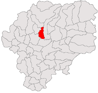 Categorie:Hărţi ale judeţului Bistriţa-Năsăud